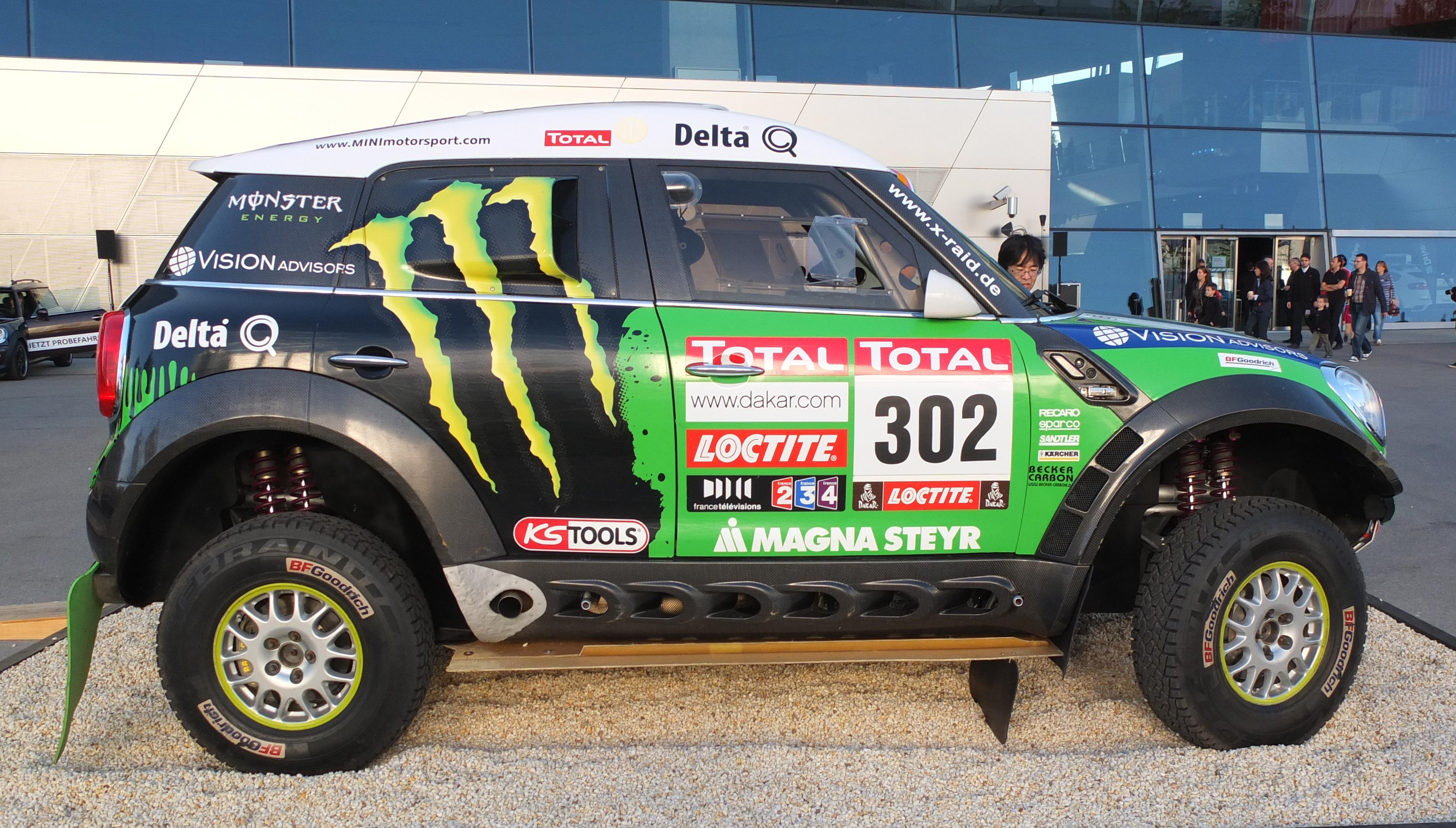 MINI All4 Racing (Rallye Dakar 2012)